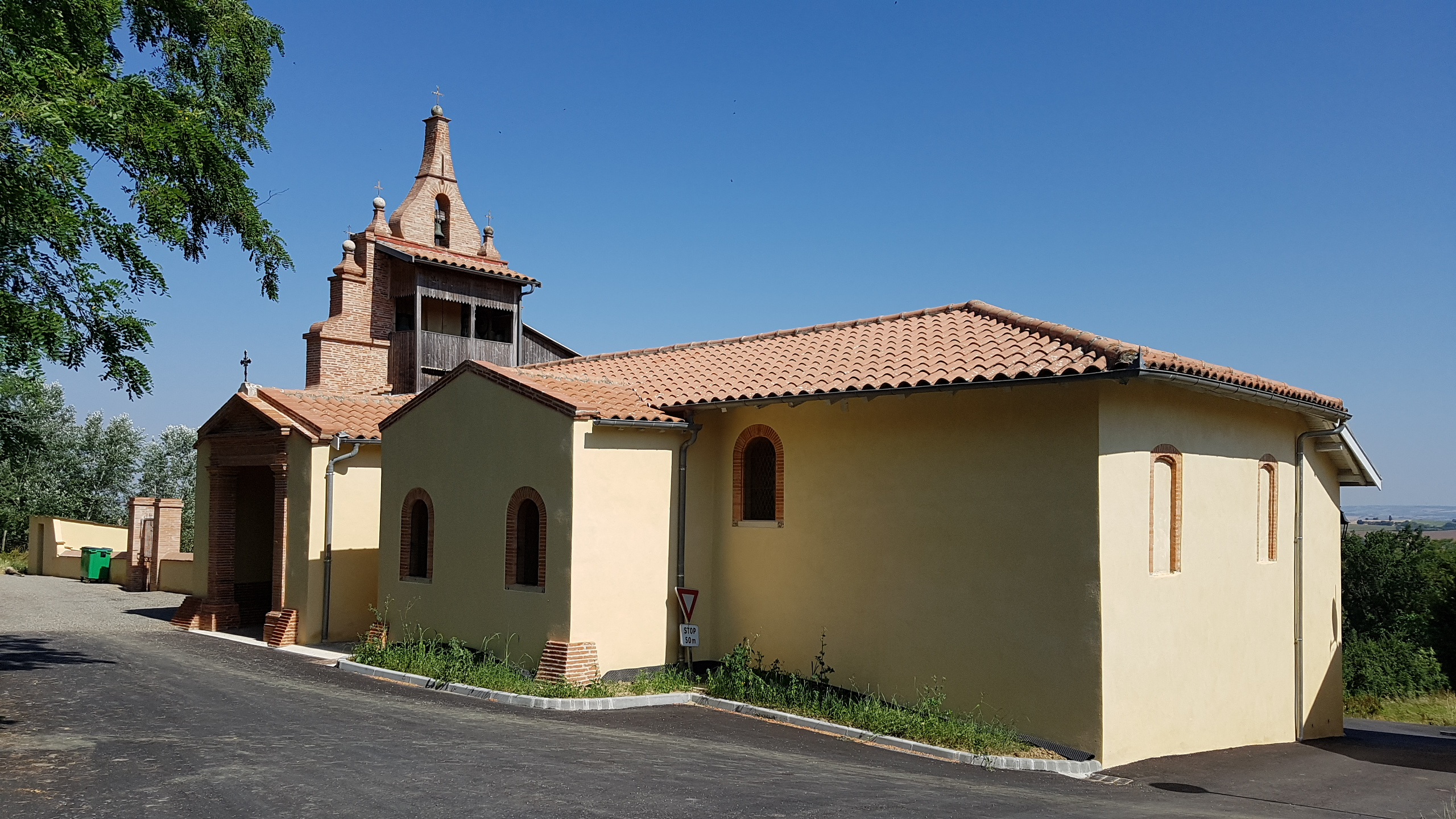 Empeaux - Eglise Saint Sabin